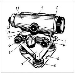 Нiвелiр Н-3; 1- корпус, 2 - мушка, 3,8 - рiвнi, 4 - навiдний винт, 5 - пружна пластинка, 6 - пiдиймальнi винтi, 7 - пiдставка, 9 - елевацийний винт, 10 - опорна площадка, 11 - маховичок, 12 - кiльце окуляра, 13 - зорова труба